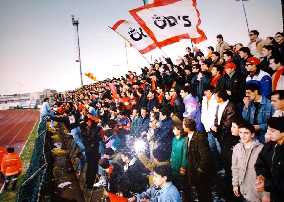 Gradinata Est a met anni '80